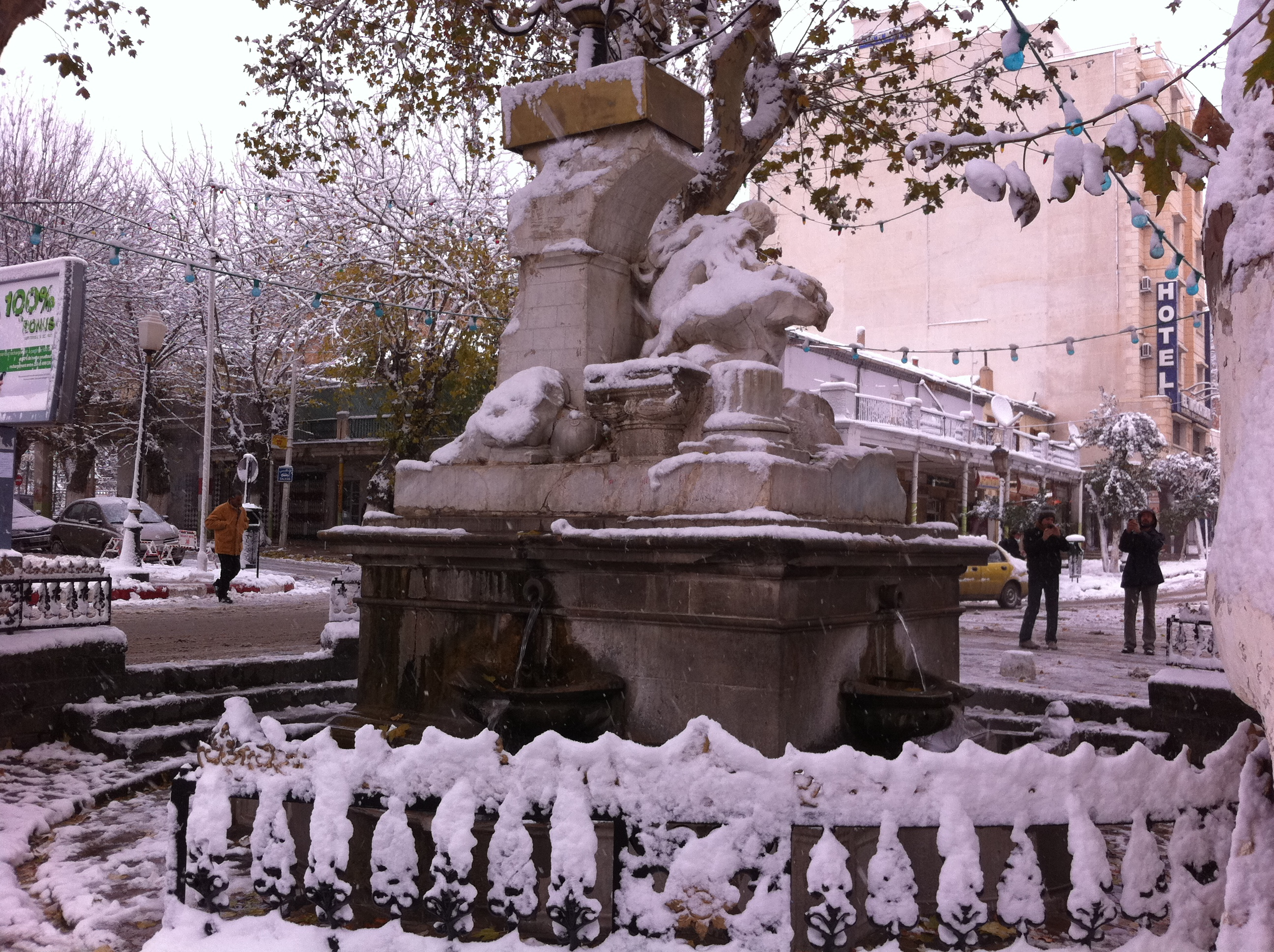 le monument historique de SETIF,AIN-ELFOUARRA sous la neige 4